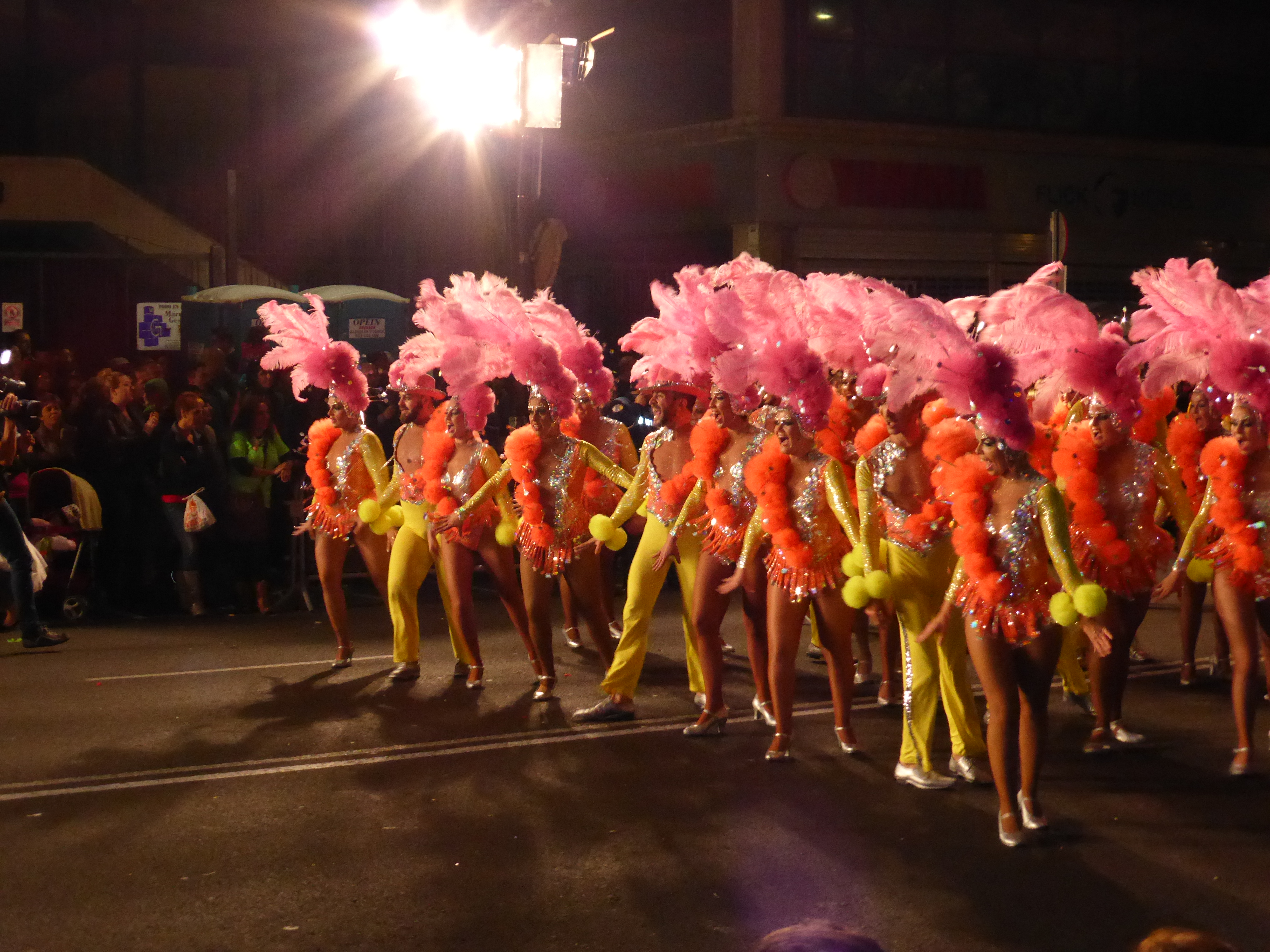 El "Sábado de Carnaval" vuelven a desfilar las comparsas y las carrozas con la reina y las damas. Aquí vemos una de las agrupaciones o comparsas, bailando.